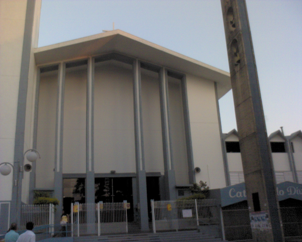 Bauru, Sao Paulo, Brazil